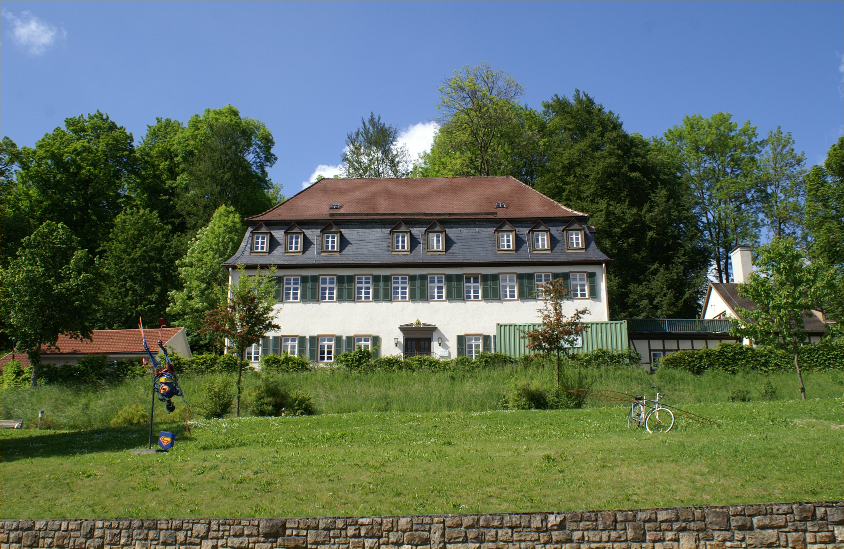 Das um 1816 errichtete klassizistische Schlossgebäude der Barone von Weidenbach in Münsingen-Buttenhausen ist heute Verwaltungssitz einer diakonischen Einrichtung